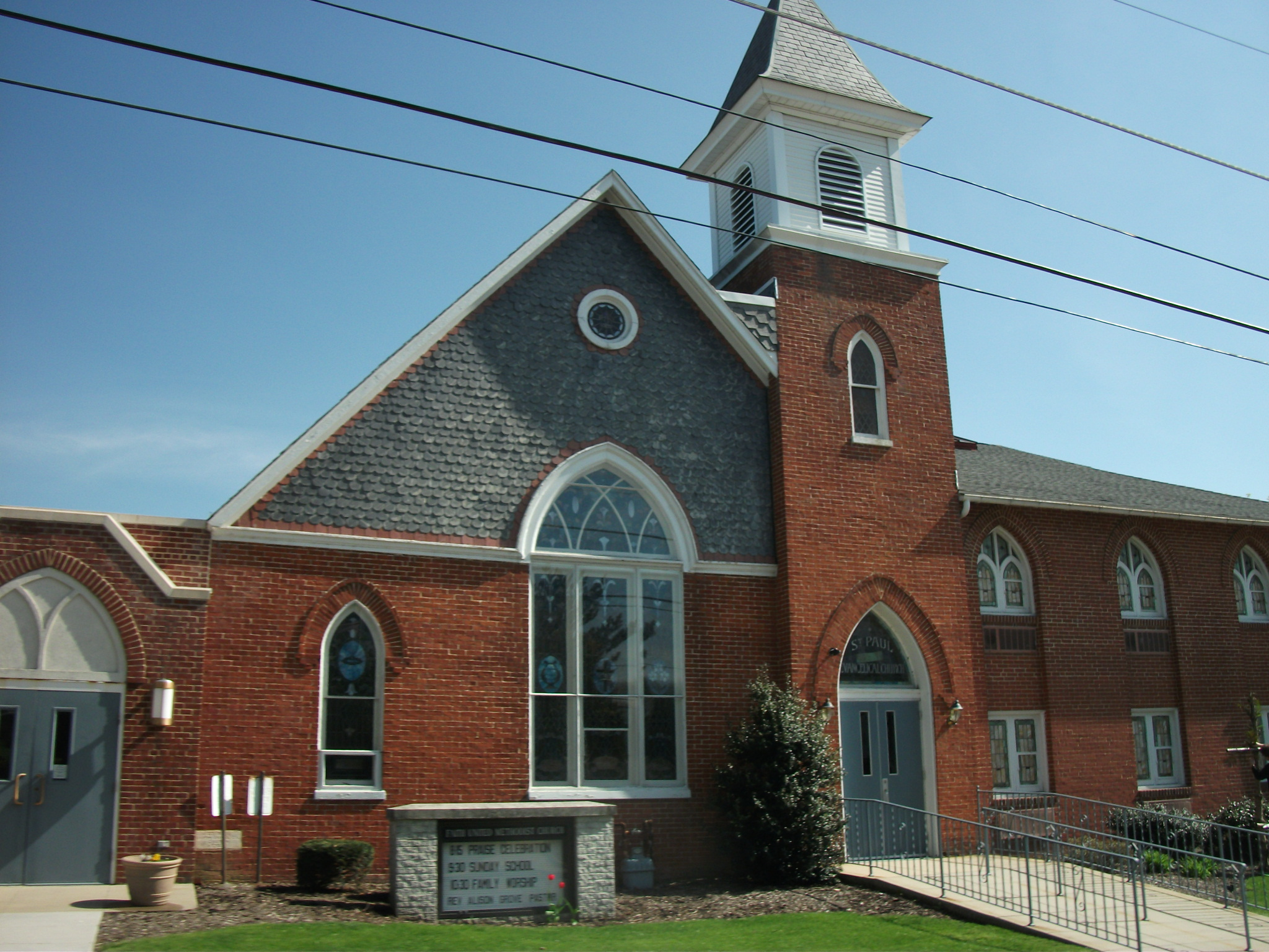 Hallam, Pennsylvania